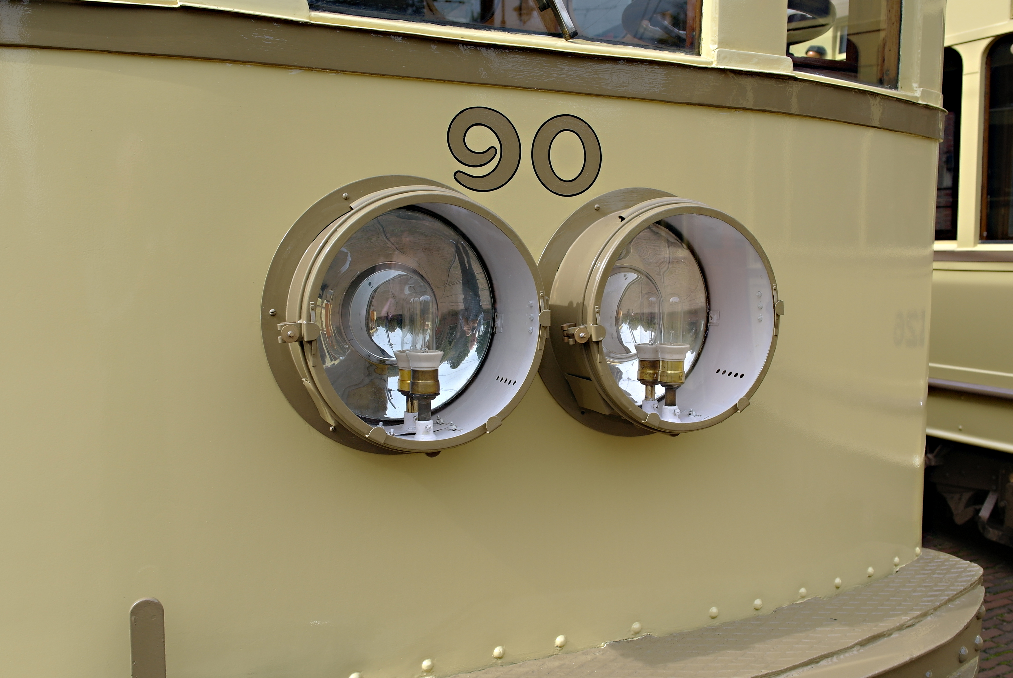 Lamen op motorwagen 90